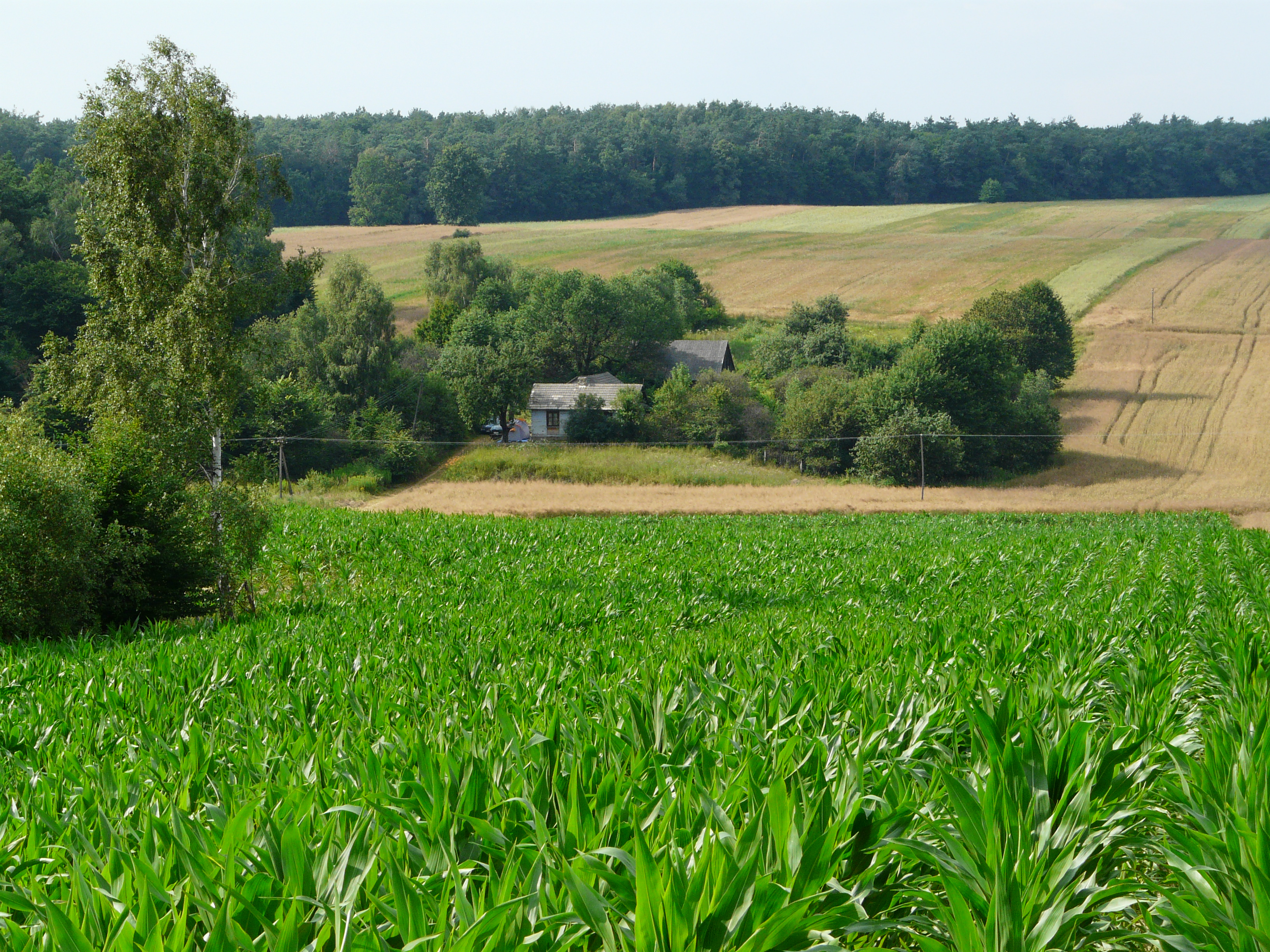 Pniaki